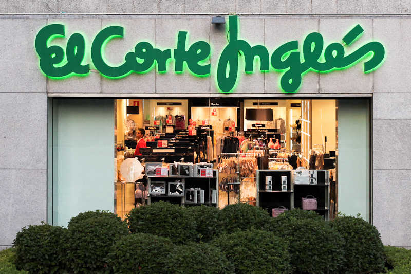 El Corte Inglés, letrero luminoso, grandes almacenes, rebajas